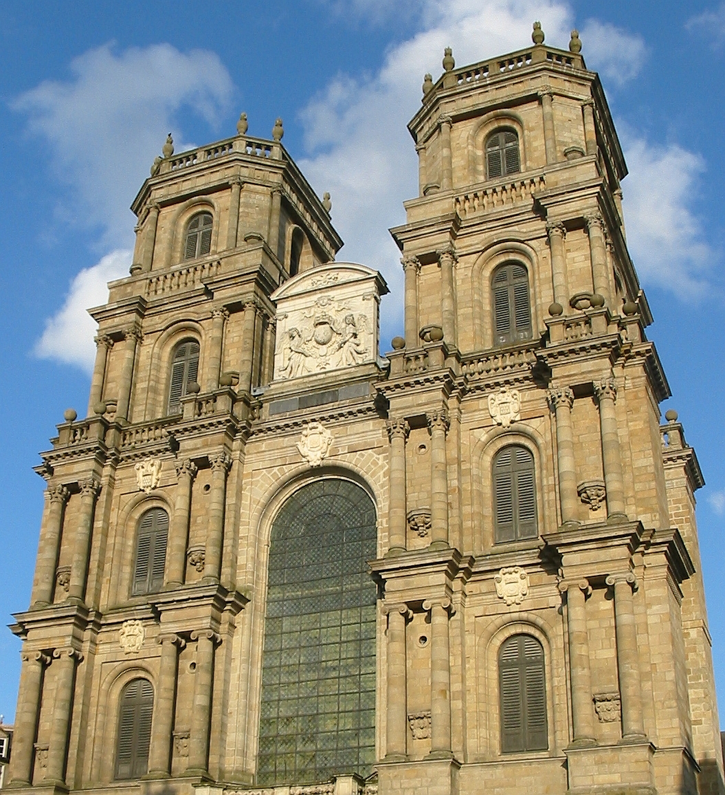 Rennes Nouormand: Rennes